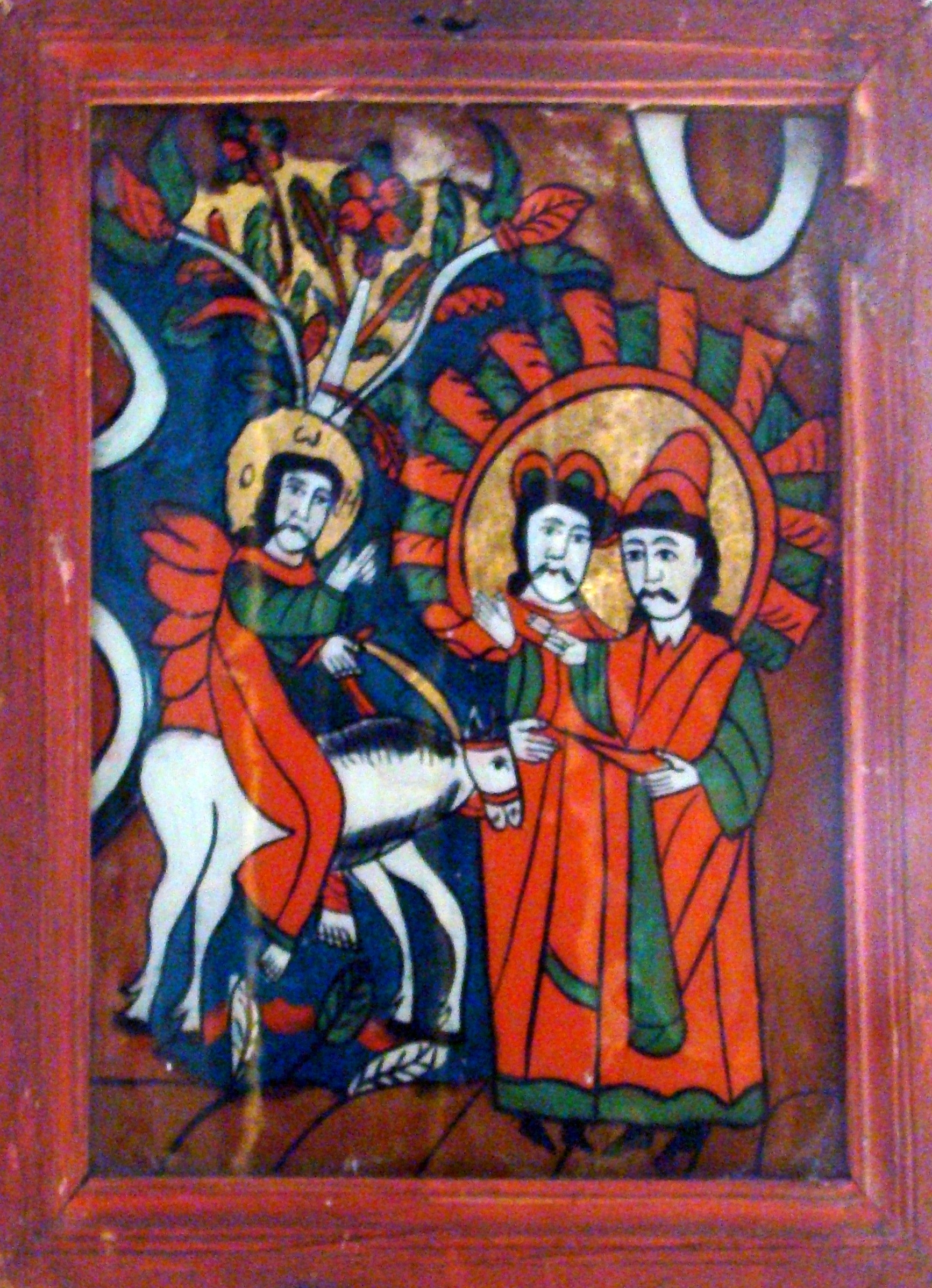 Dealu Geoagiului, județul Alba